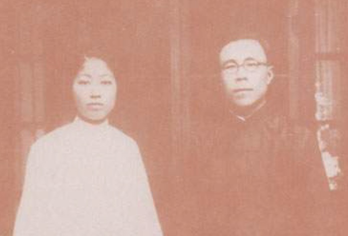 中文（中国大陆）: 1928年8月8日王明道与太太刘景文结婚